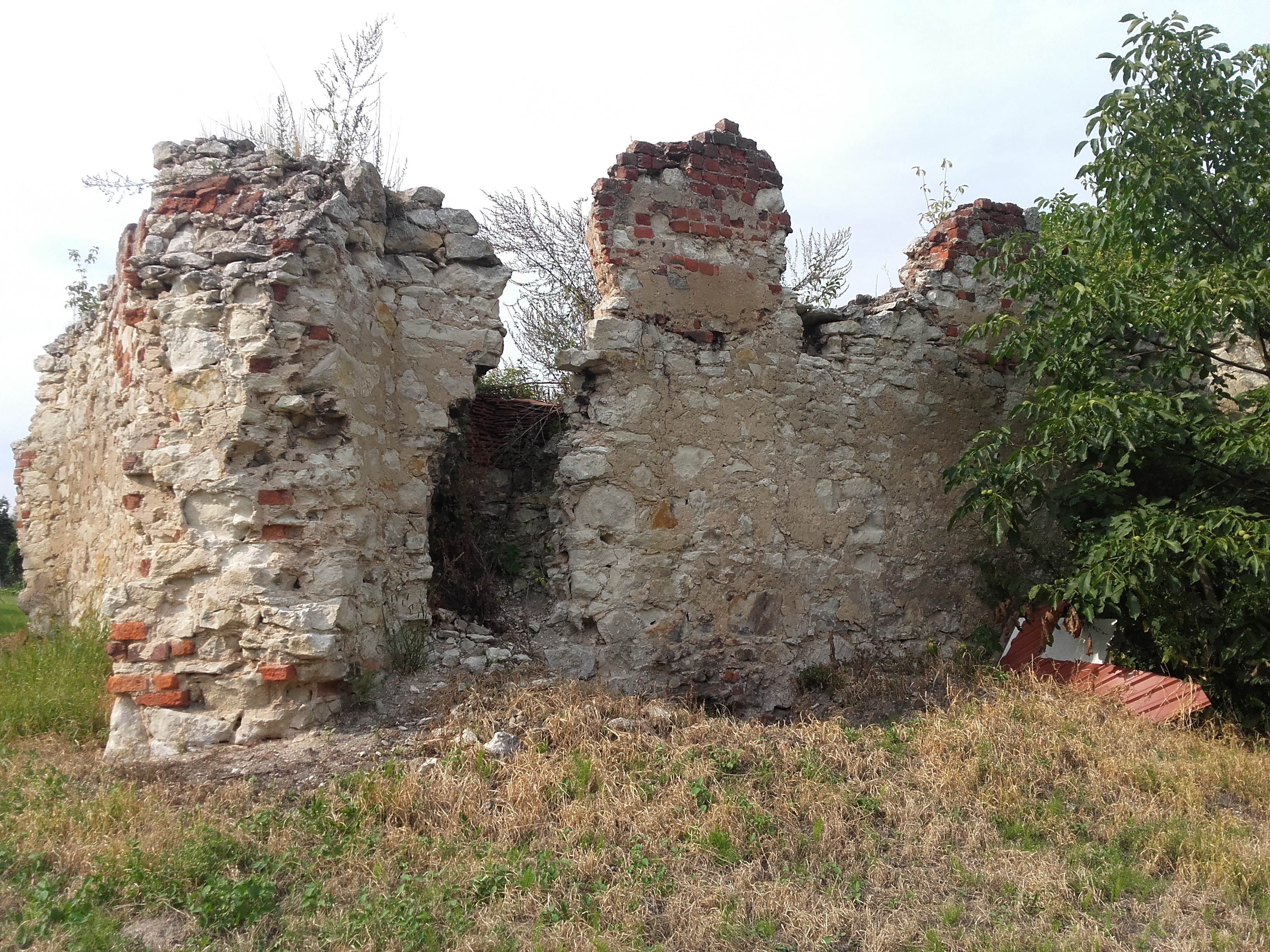 Bochotnica - pozostałości kaplicy grobowej – mauzoleum Jana Oleśnickiego vel Bochotnickiego, XVI (widok z tyłu)